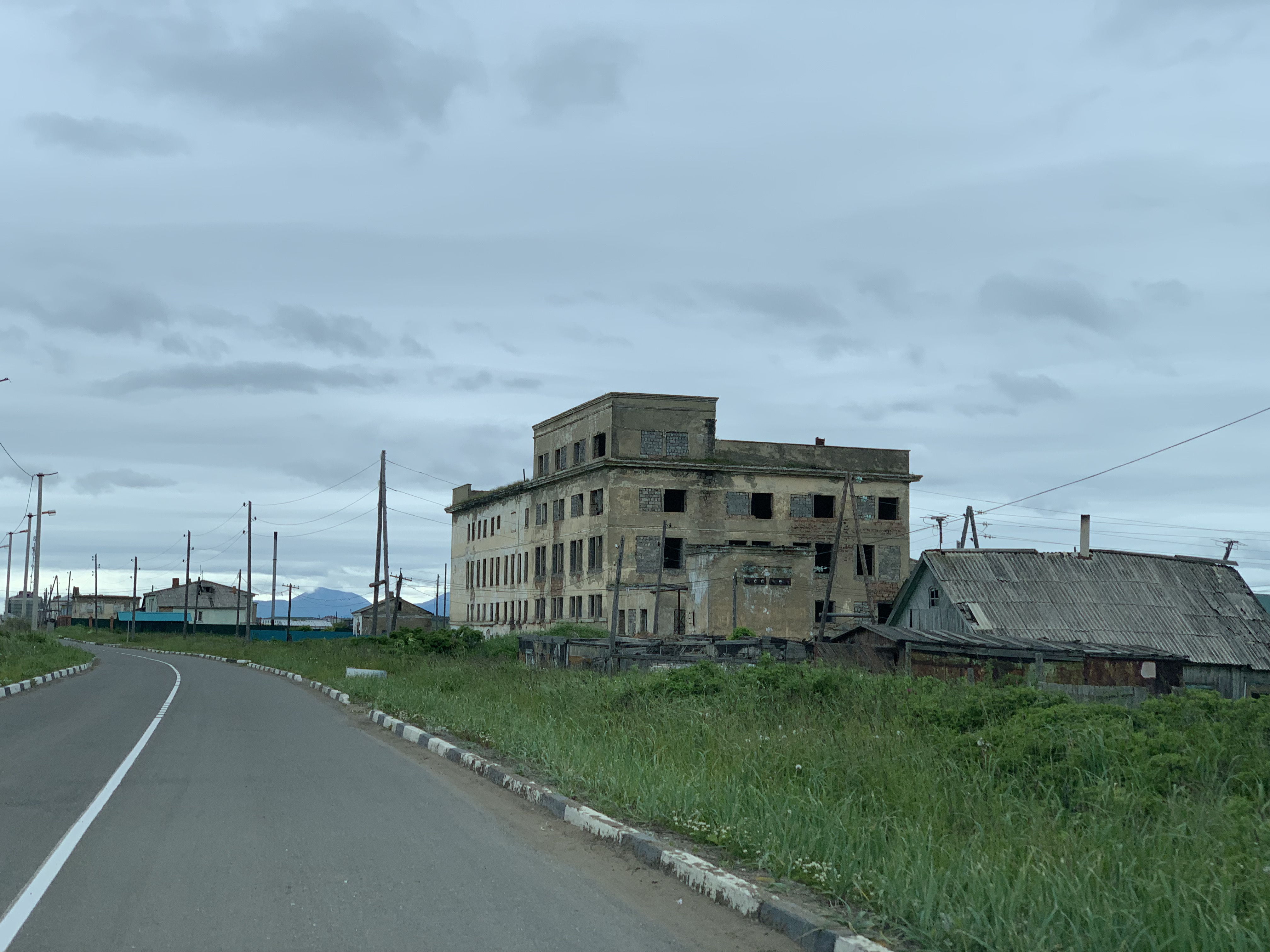 Пивзавод Красногорск Сахалин